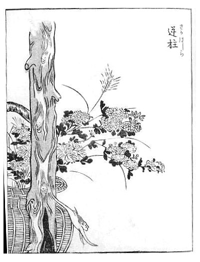 Sakabashira (逆柱) from the Gazu Hyakki Yakō